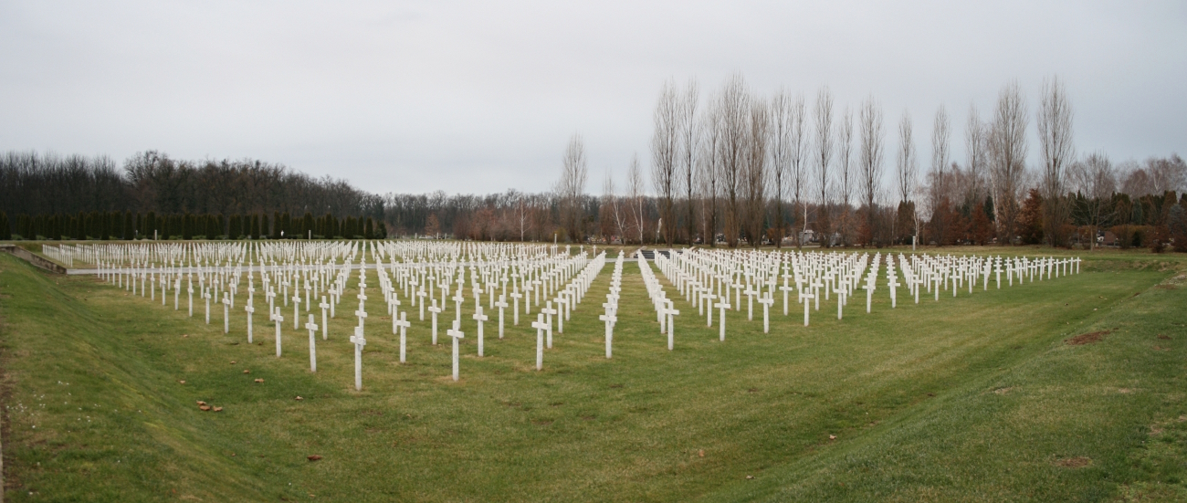 Masovna grobnica s 938 križeva na Memorijalnom groblju žrtava iz Domovinskog rata u Vukovaru